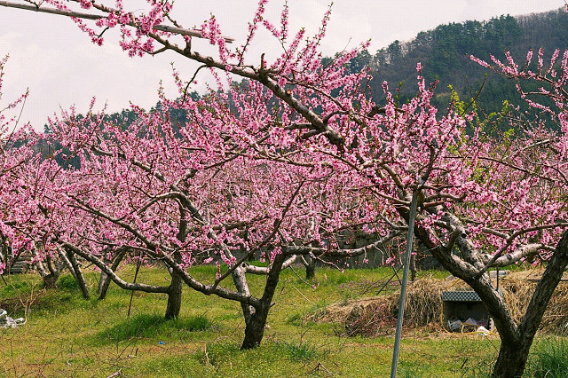 モモ（山梨県笛吹市） Prunus persica (Fuefuki-city, Yamanashi, Japan)